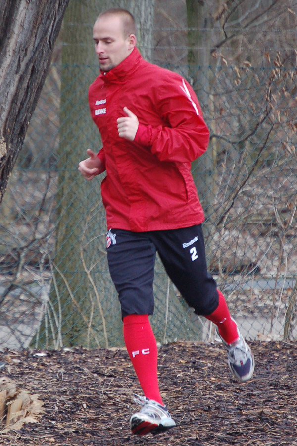 Miso Brecko